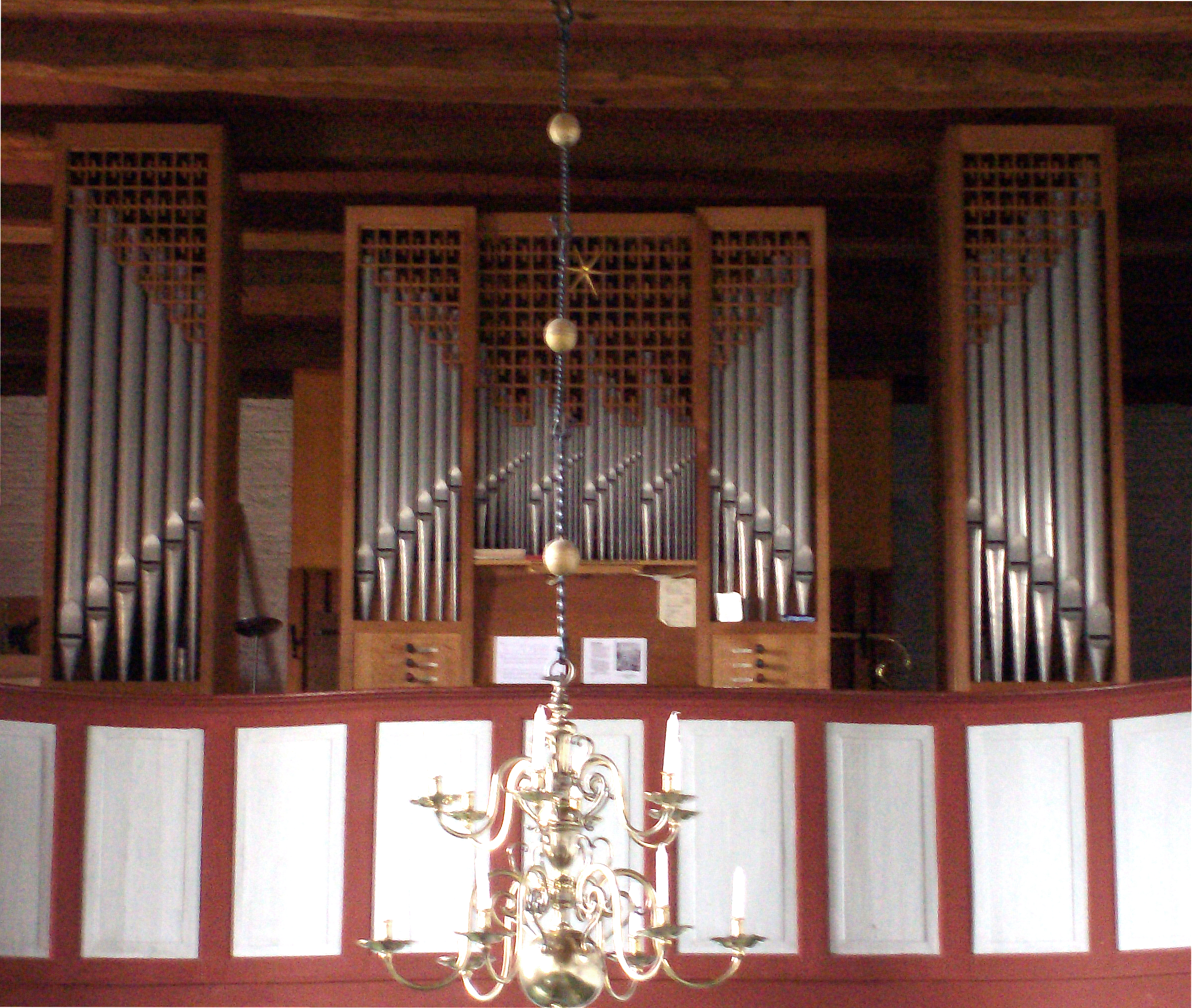 Orgel der ev.-luth. Matthäikirche in Leer-Bingum